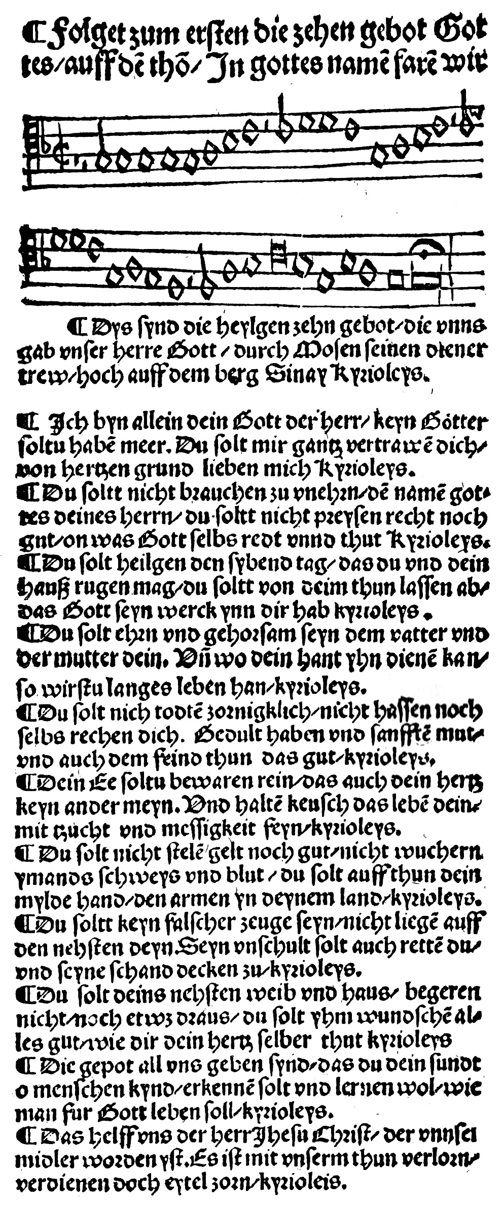 Martin Luther: Dies sind die heilgen zehn Gebot, Erfurter Enchiridion 1524